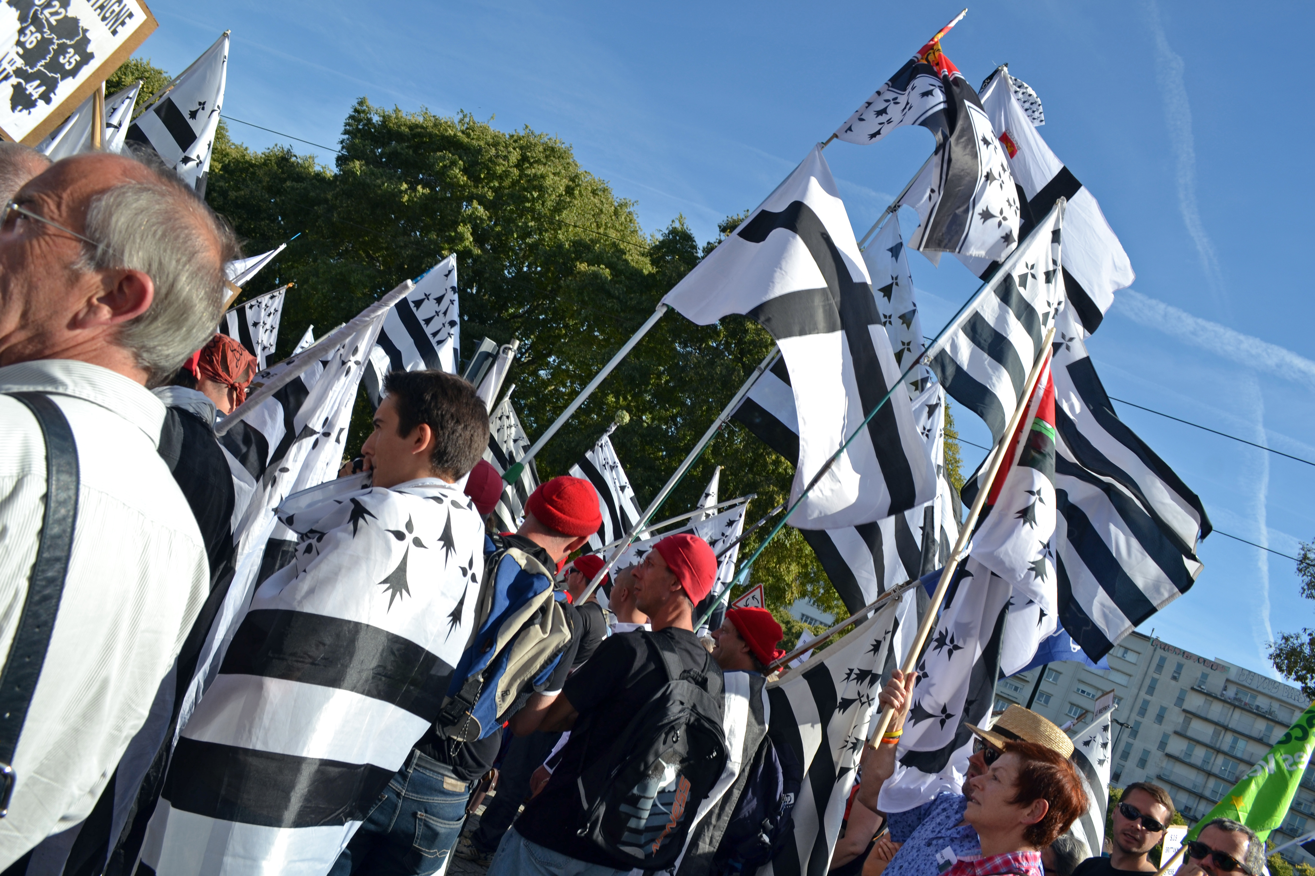 Des milliers de drapeaux bretons brandis à Nantes le 27 septembre 2014 pour célébrer la Bretagne entière et son projet d'avenir commun. La 3e grande manifestation populaire de l'année revendiquait une cohérence territoriale, économique, culturelle, pour que la péninsule plus que millénaire conserve son unité.